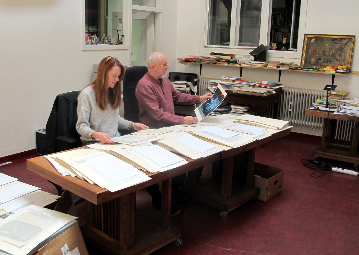 Rainer Buland mit Assistentin im Raum des Archivs für Spielforschung in Salzburg. Dieses Foto stammt aus Privatbesitz von Rainer Buland und wird mit Einwilligung von Sarah Kretschmer (auf dem Bild mit drauf) verwendet